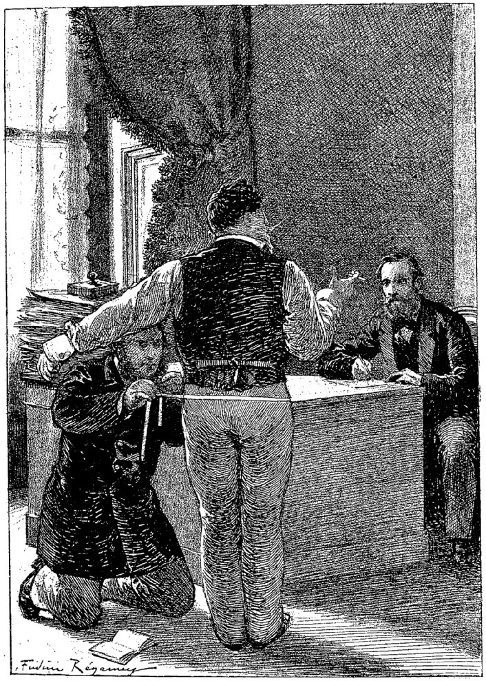 "L'empereur fonde le journal L’Époque, avec le concours de son tailleur M. Dusautoy et de M. Clément Duvernois".